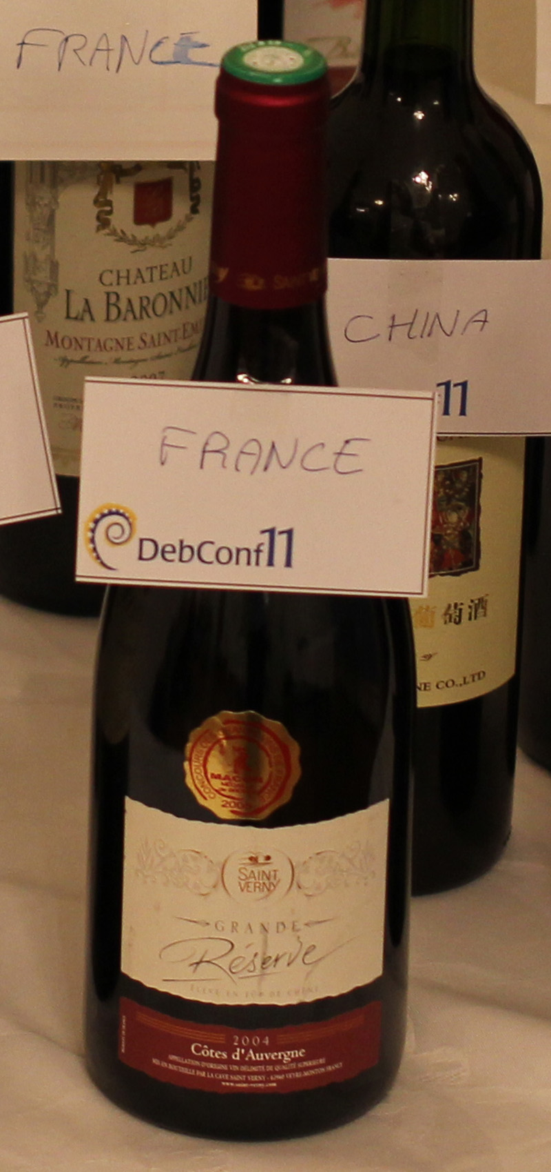 Bouteille de côtes-d'auvergne de la cave coopérative de Saint-Verny déjà récompensée d'une médaille d'or au concours des vins de Mâcon